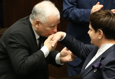 Jarosław Kaczyński dziękuje Beacie Szydło za wystąpienie w Sejmie RP. (cropped). 39. posiedzenie Sejmu - trzeci dzień.